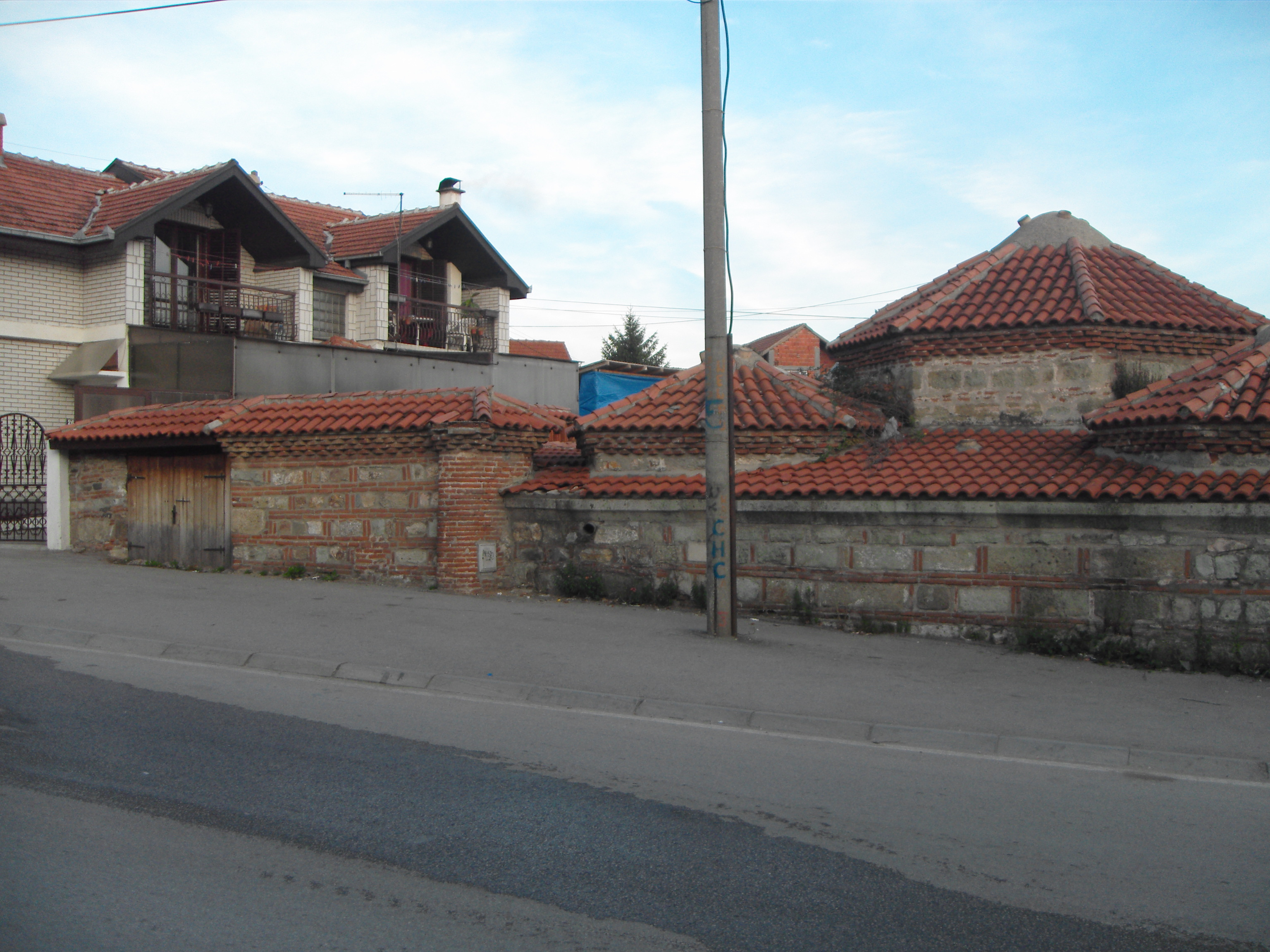 Стари амам, саграђен крајем XVII века